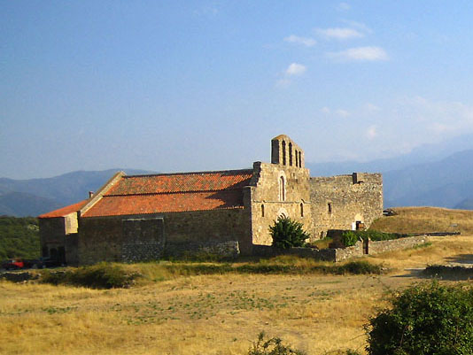 Foto digital del Priorat de Marcèvol, al municipi nord-català d'Arboçols de Conflent